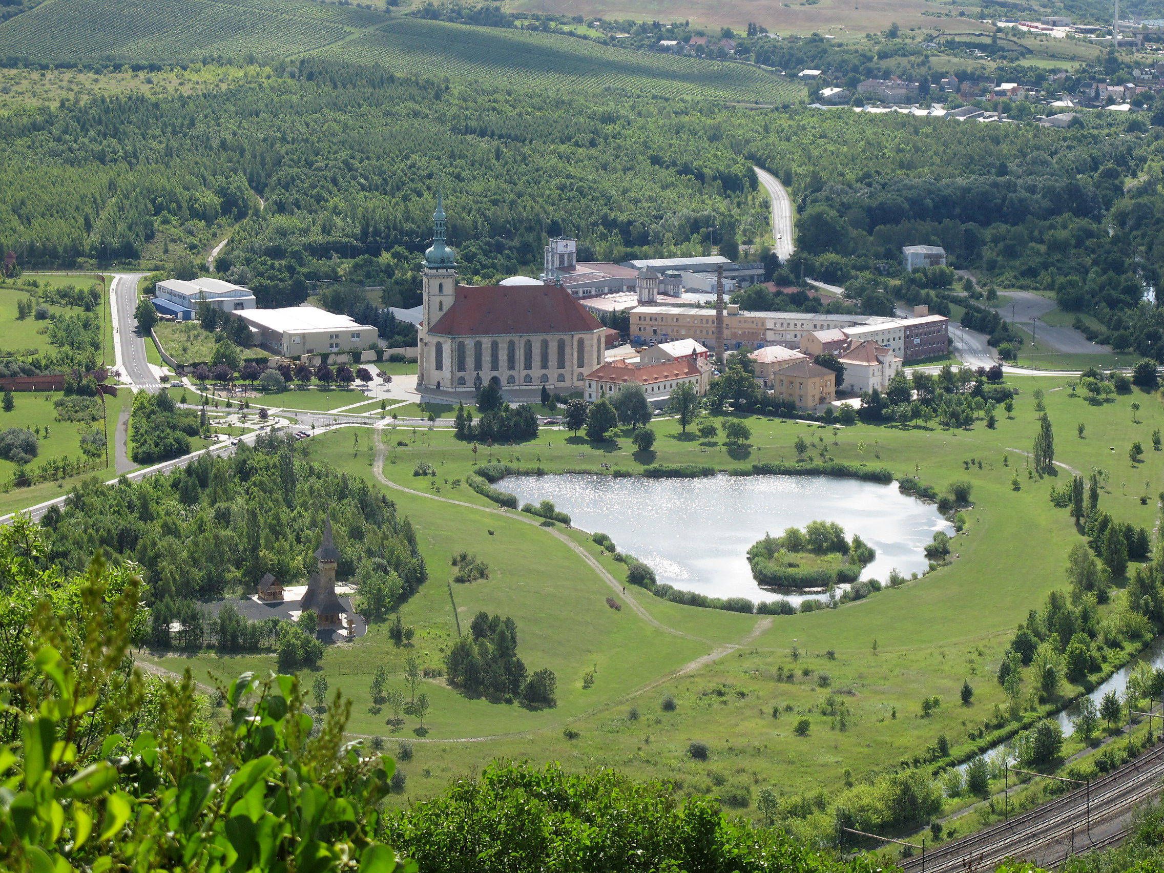 Pohled z kopce Hněvín na děkanský kostel